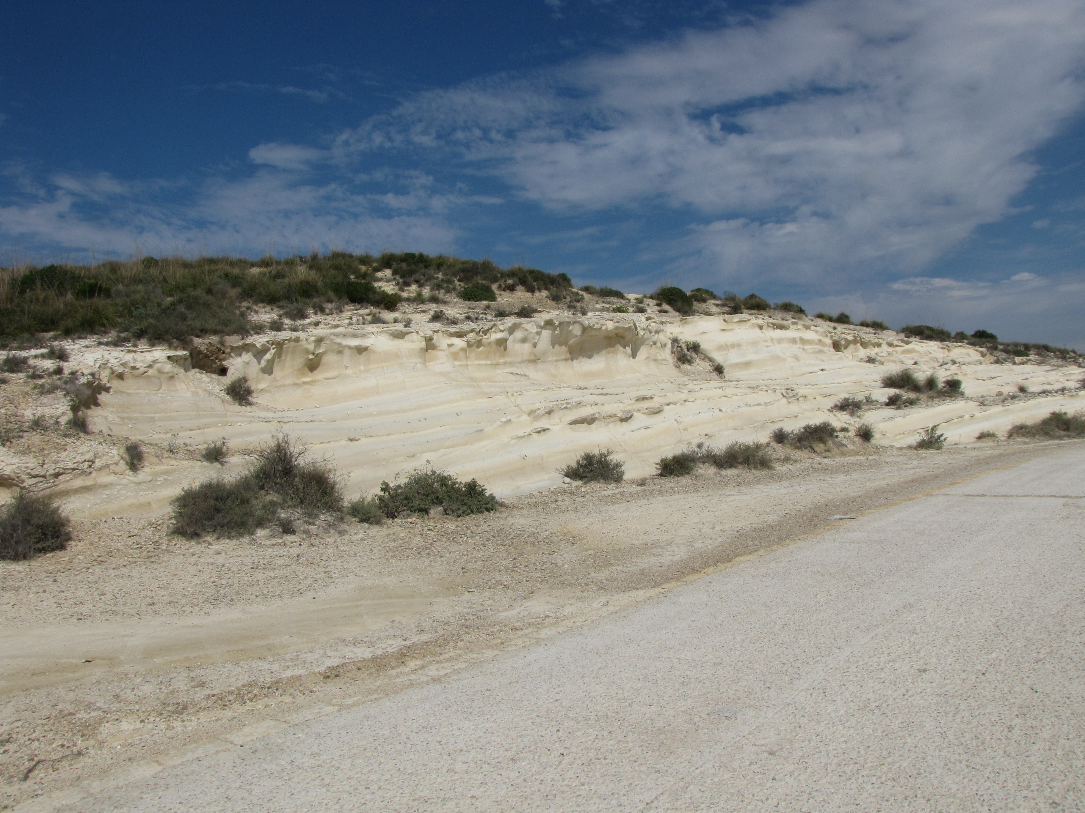 de witte kust-Capo Bianco-Eraclea Minoa